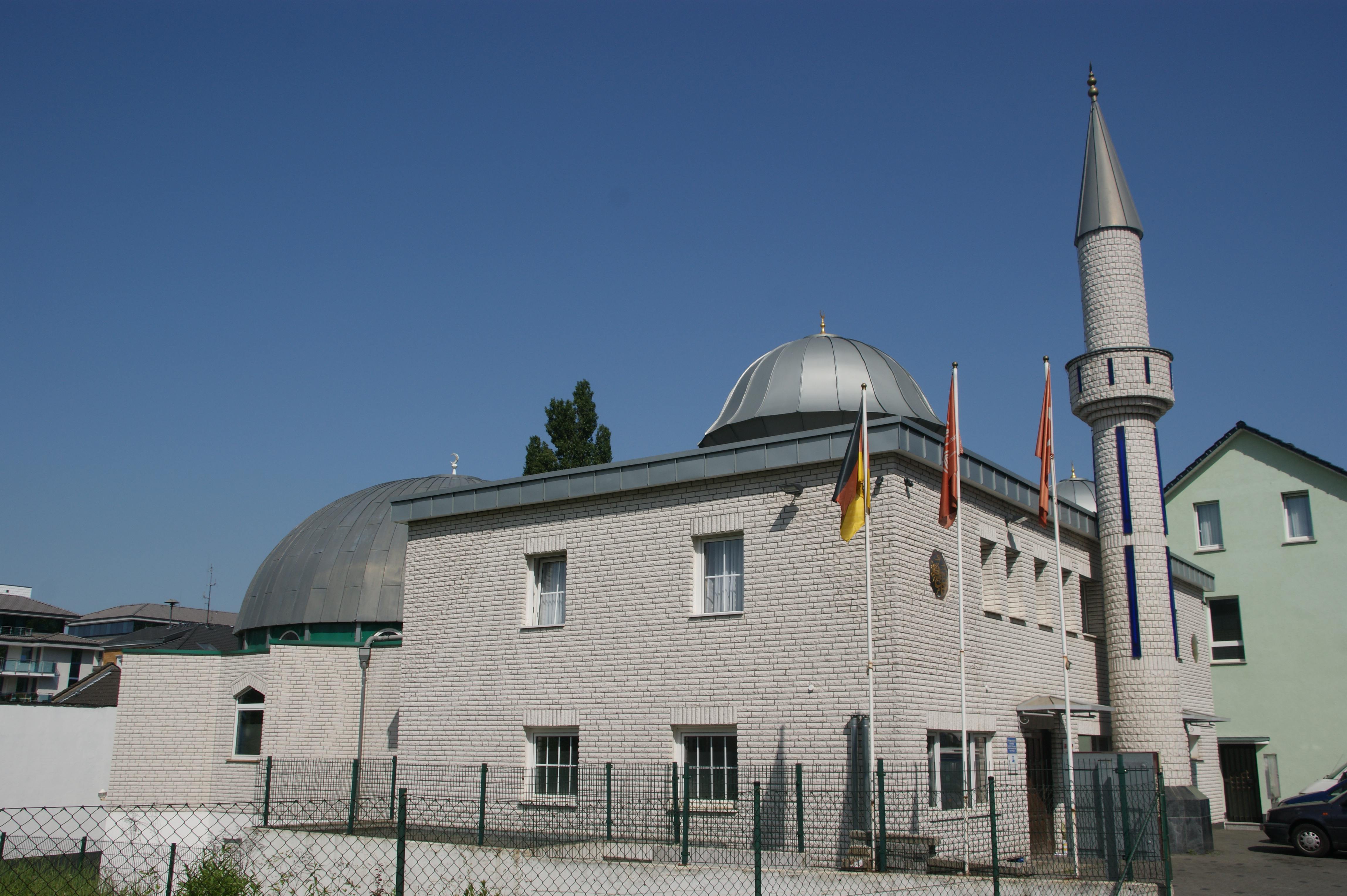 Moschee in Königswinter, Am Stadtgarten 16/Steinmetzstraße